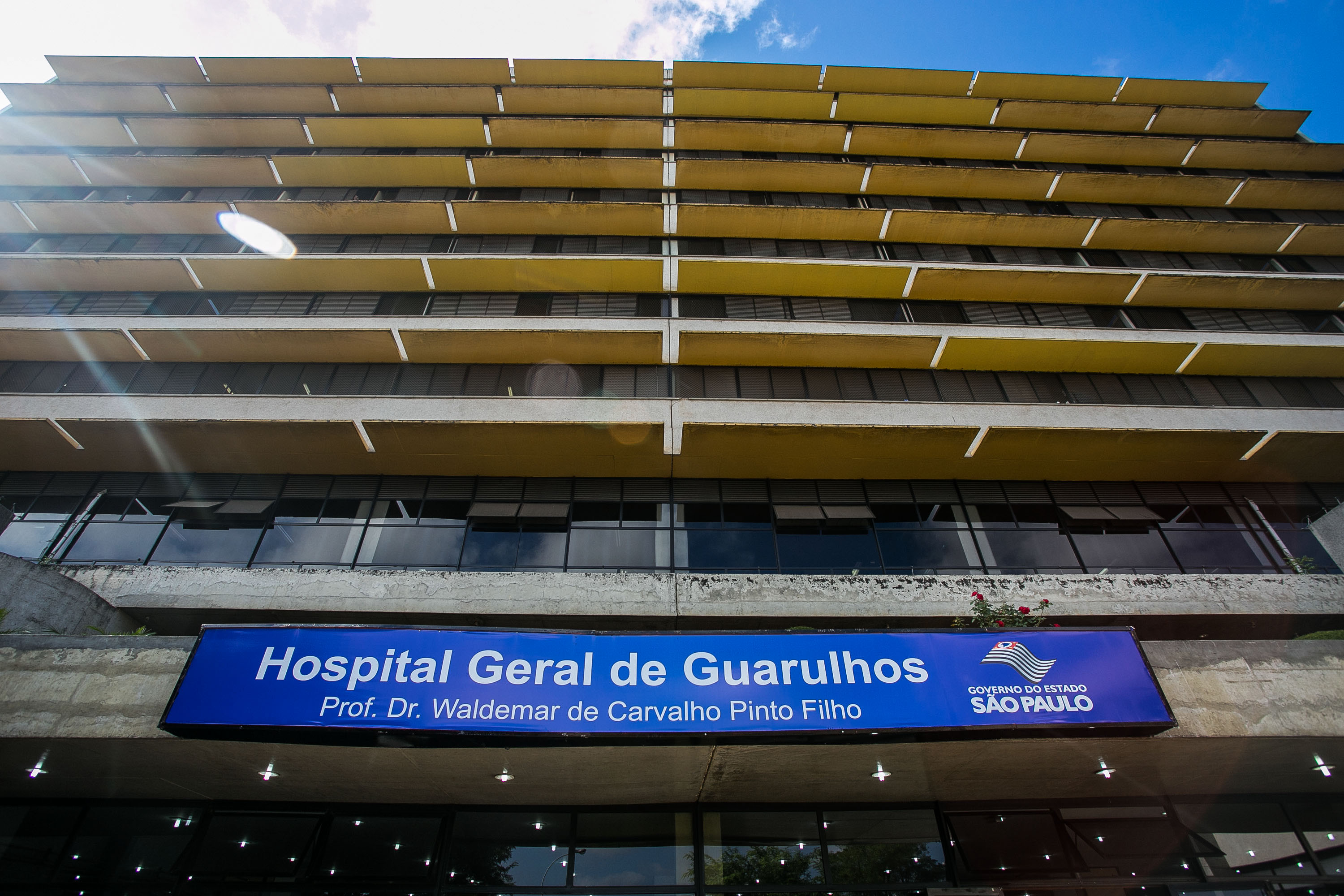 O governador Geraldo Alckmin participa da Inauguração do serviço da Rede Hebe Camargo de combate ao câncer no Hospital Geral de Guarulhos em São Paulo. Data: 02/03/2015. Local: Guarulhos/SP. Foto: Diogo Moreira/A2 FOTOGRAFIA.